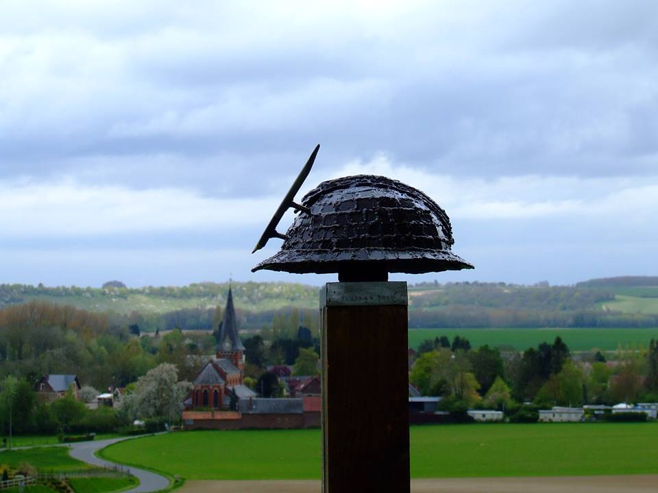 Monument Arthur Knaap au Calvaire de Frise, oeuvre de Tim Tubée